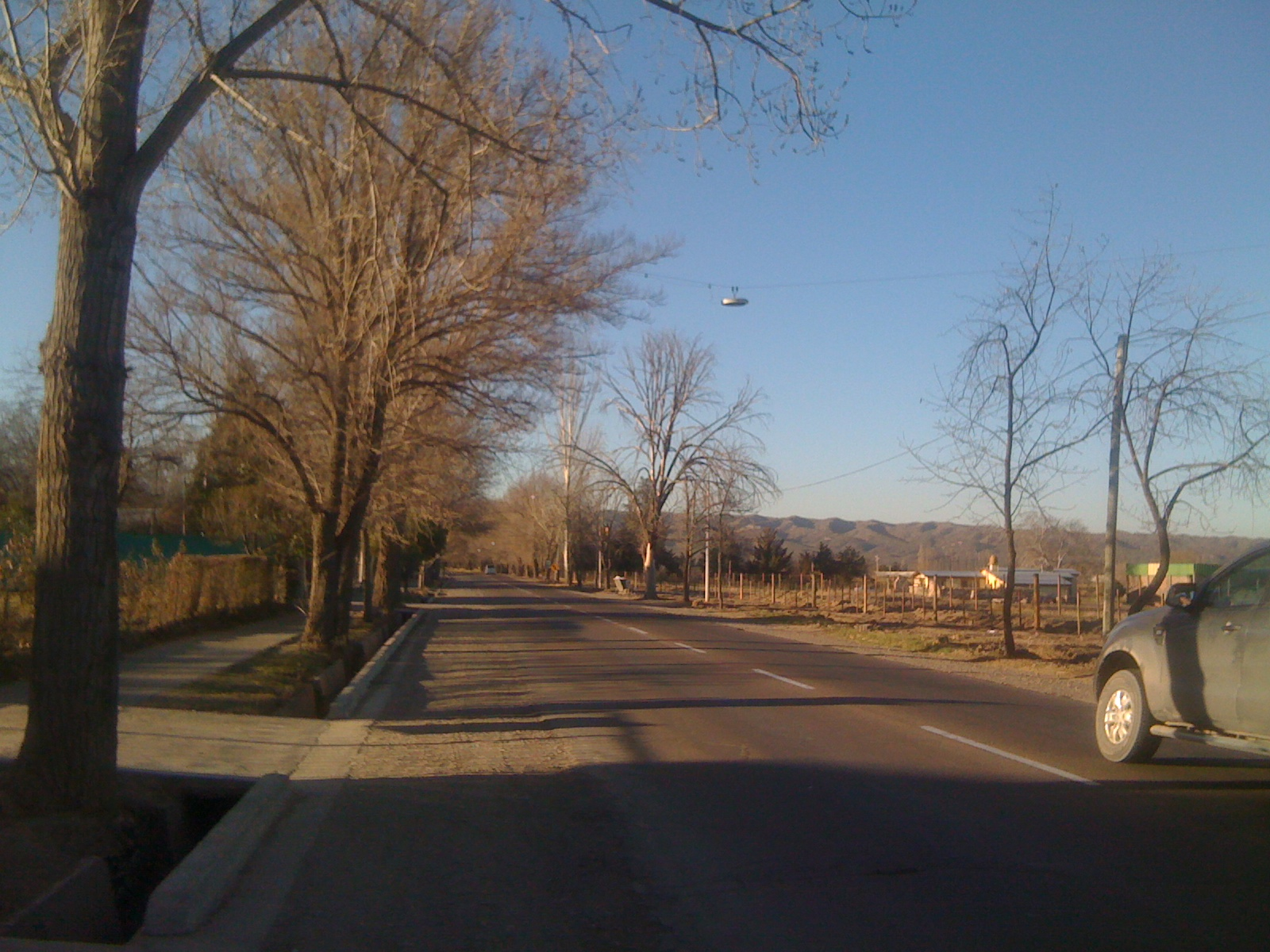 Vista Flores, Tupungato